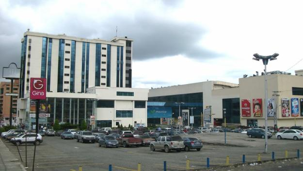 C.C Plaza.